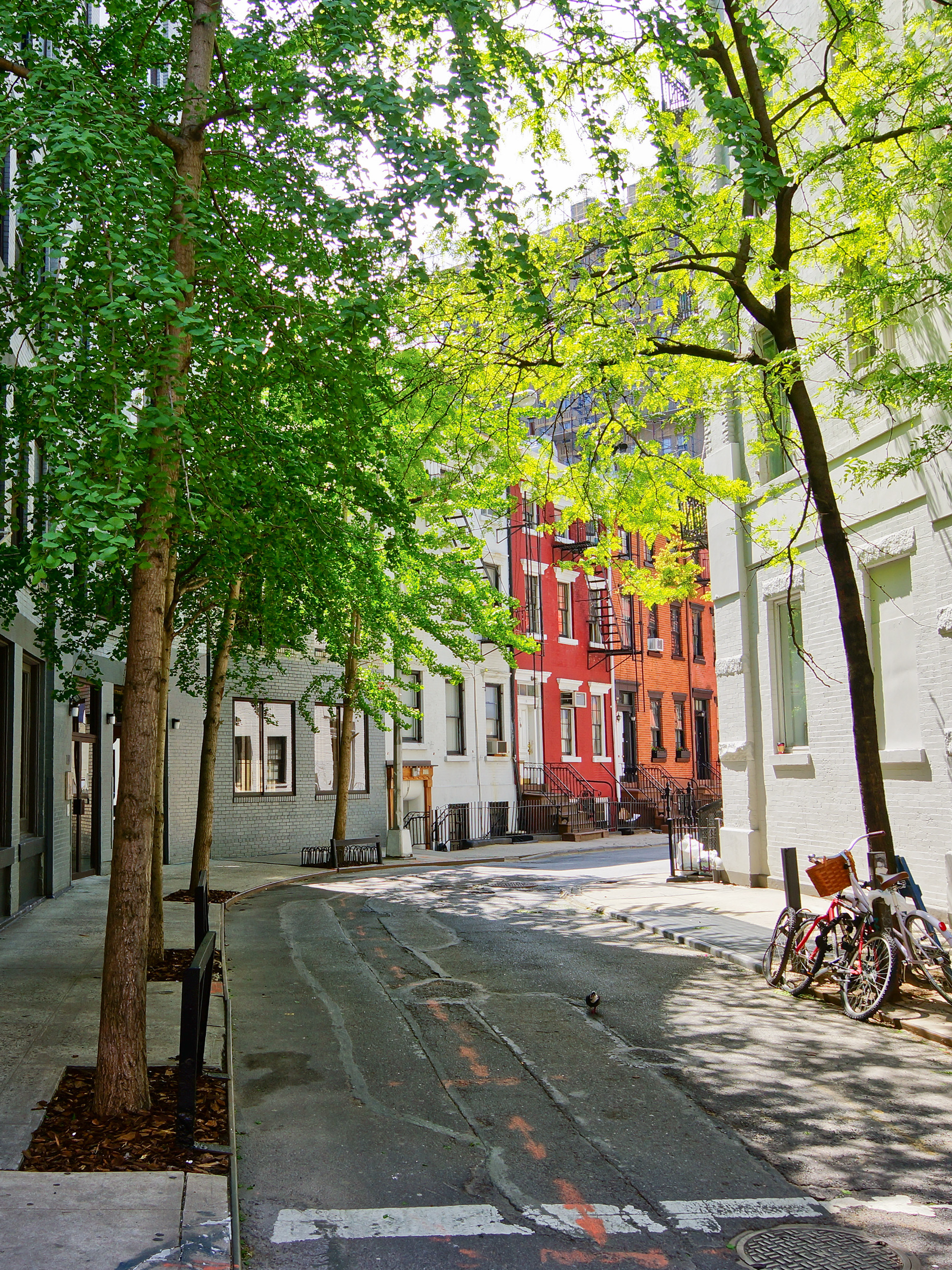 NYC - Greenwich Village - Gay Street